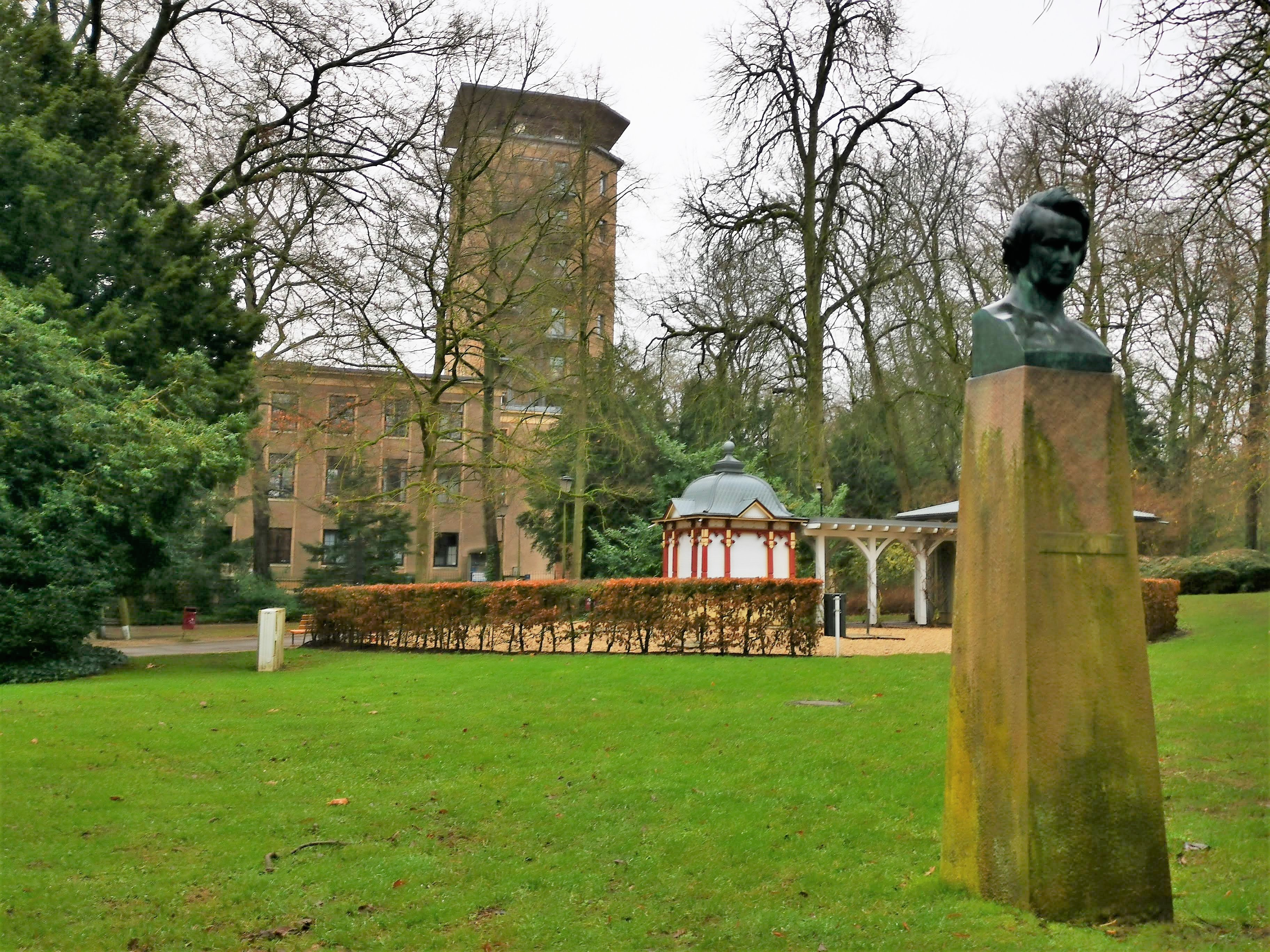 Luxembourg, buste de Victor Hugo près de l'aire de jeu "bâteau pirates" dans le parc Louvigny. À l'arrière-plan, la Villa Louvigny.